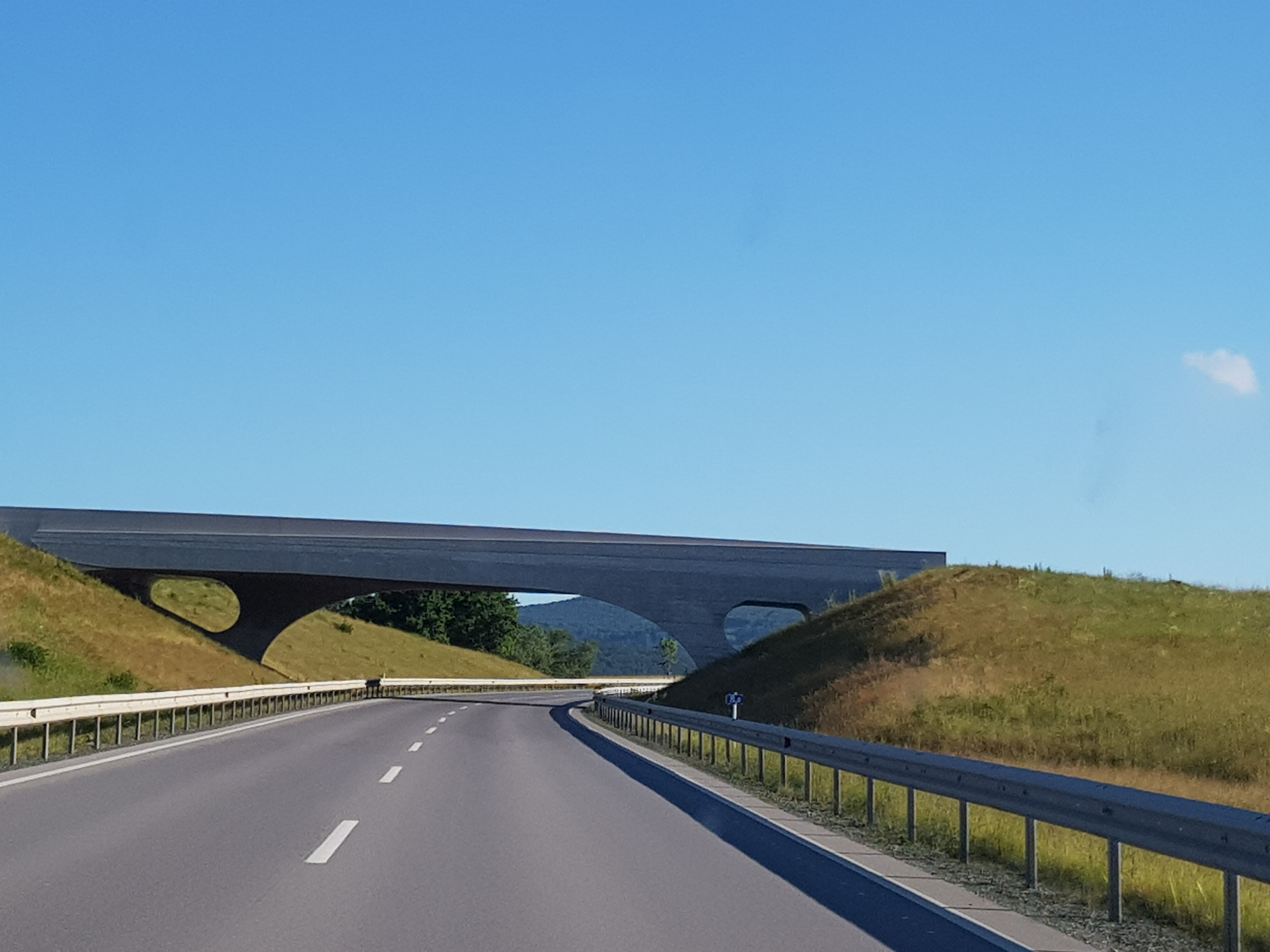 B61a bei Rattersdorf